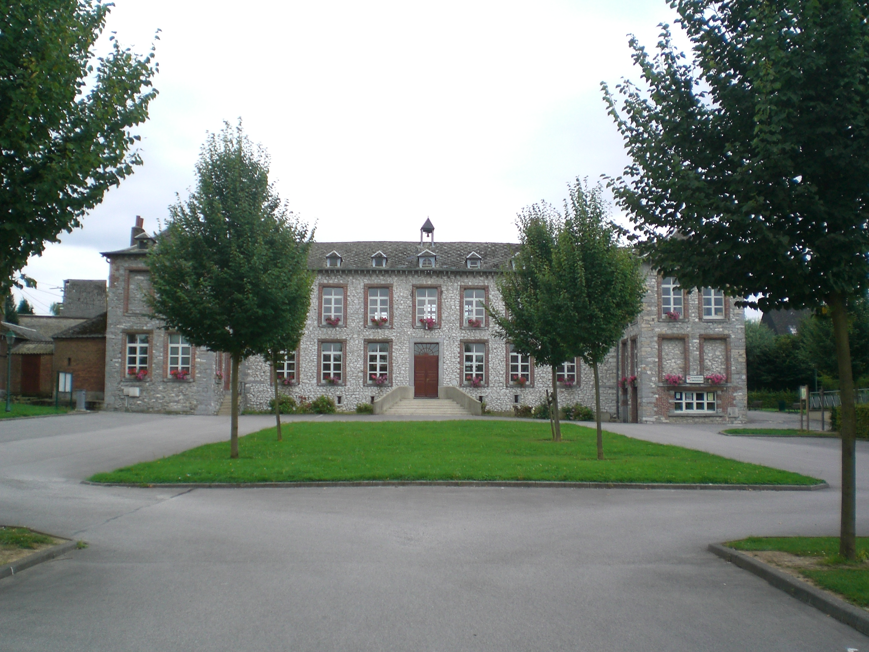 mairie de Ferrière-la-Petite nord france